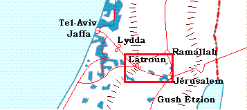 Théâtre de l'opération Nachshon durant la Guerre civile de 1947-1948 en Palestine mandataire